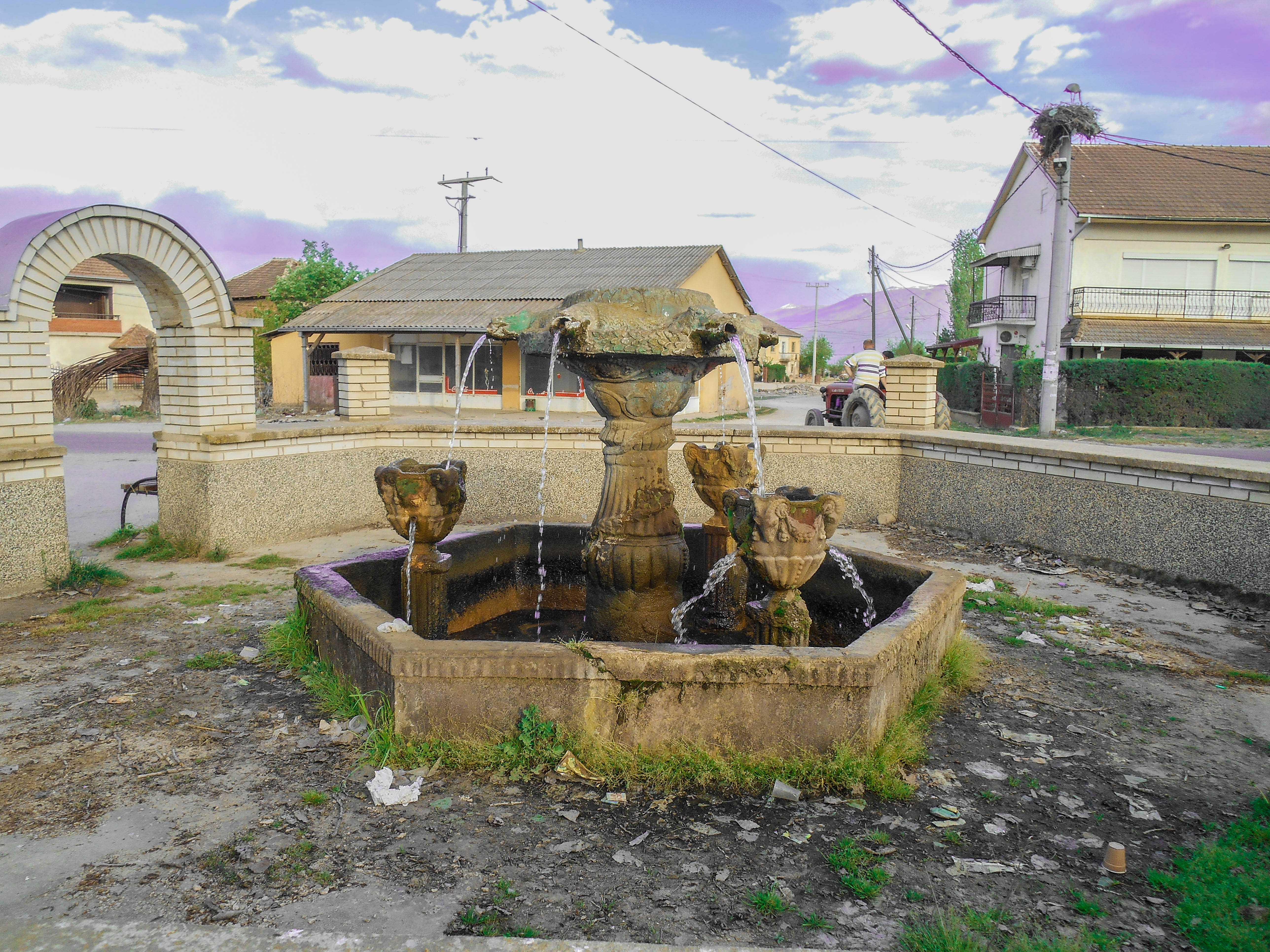 Селска чешма